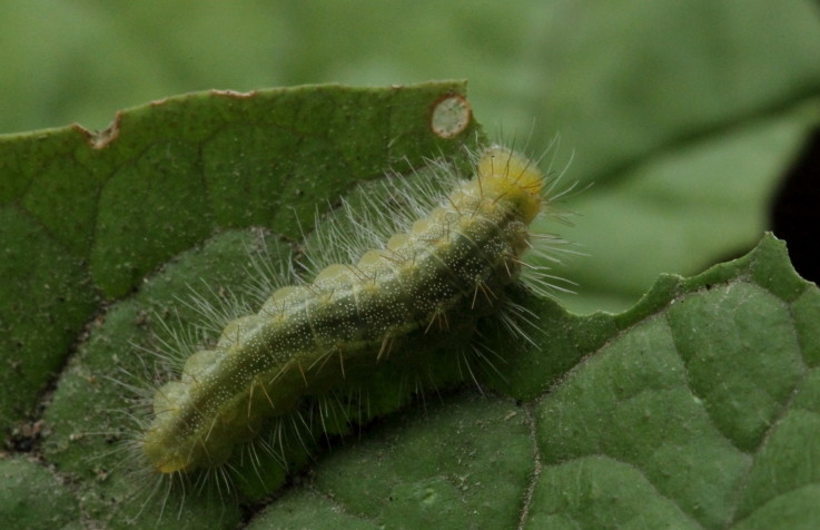 PLUM JUDY (Abisara echerius)